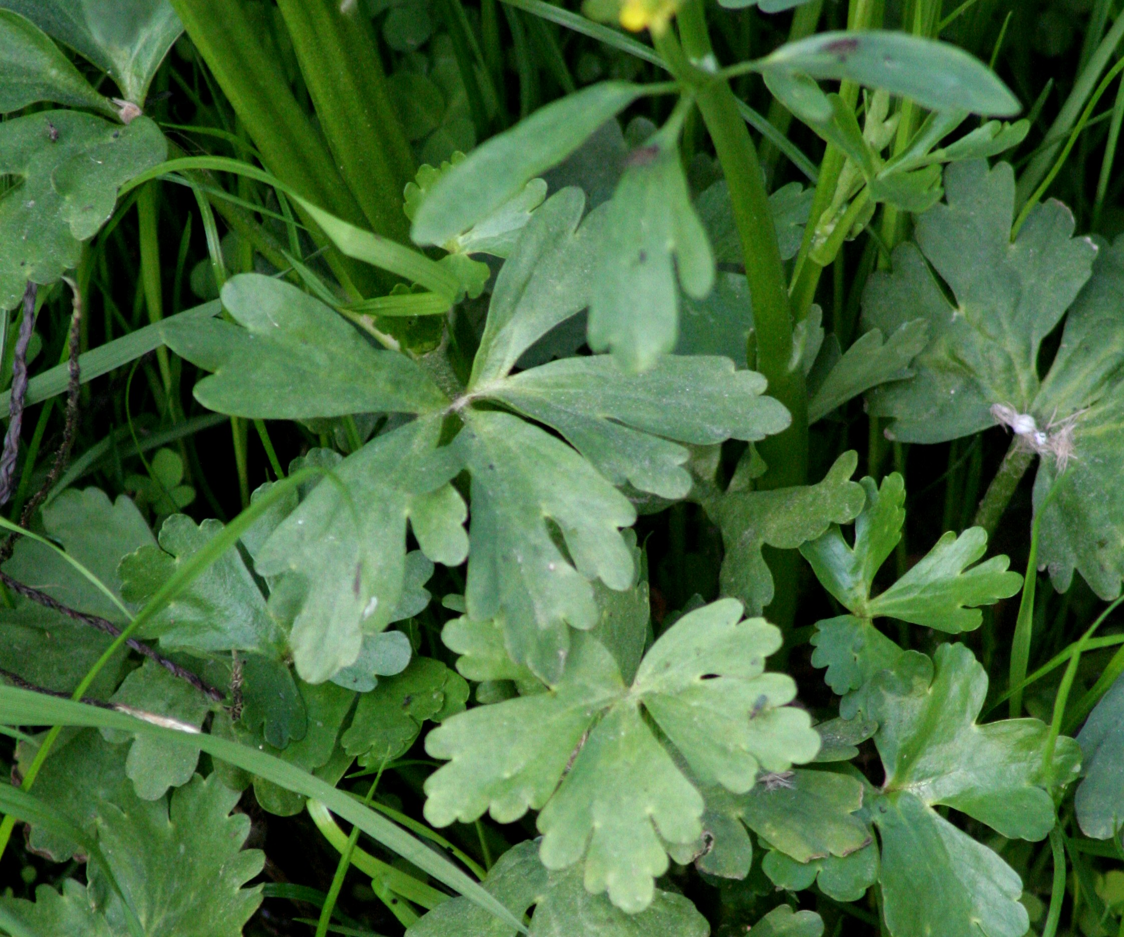 Ranuncolo di palude - Località: Canizzano (TV), 10 m s.l.m.